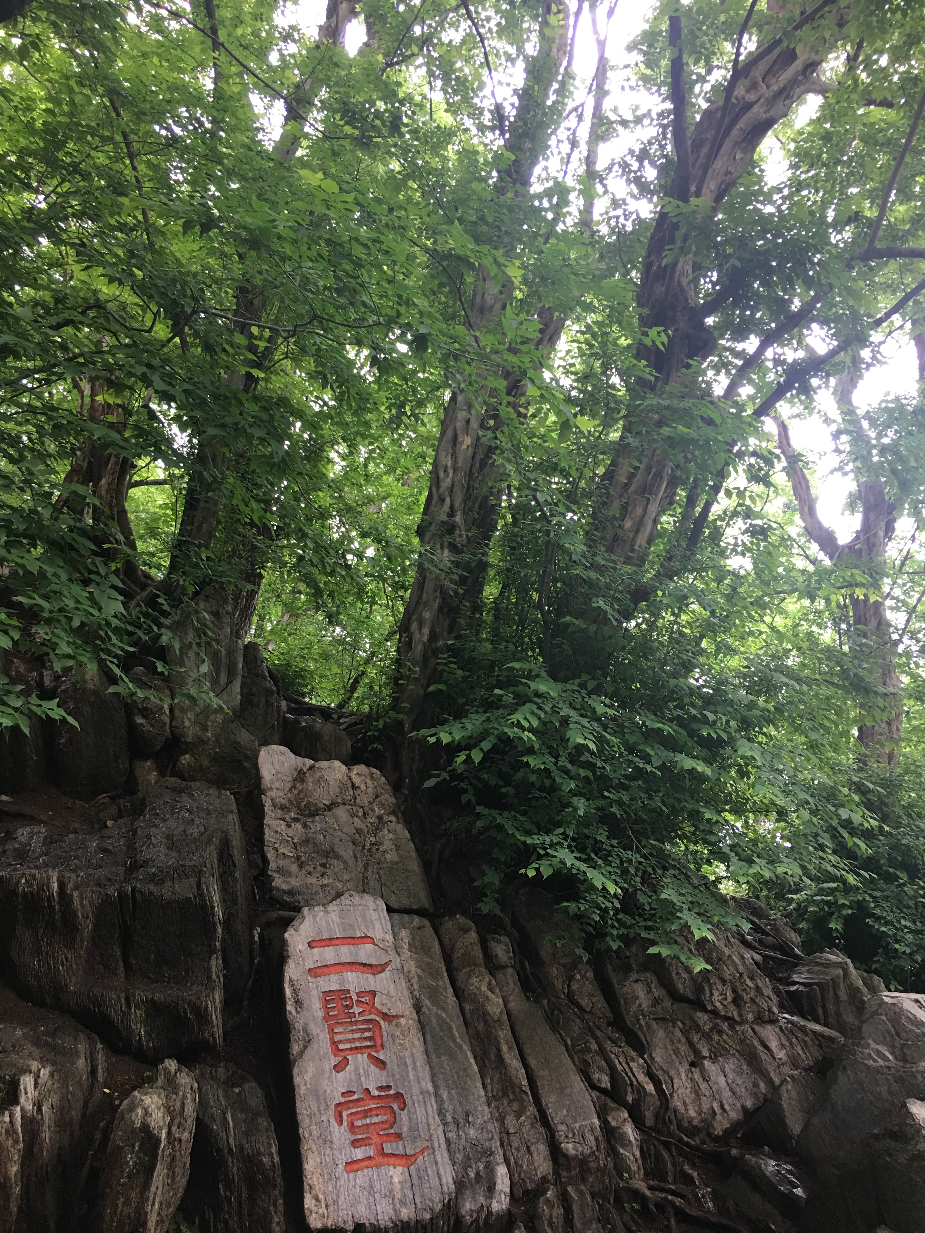 中文（中国大陆）: 我目前代拍的琅琊山摩崖石刻